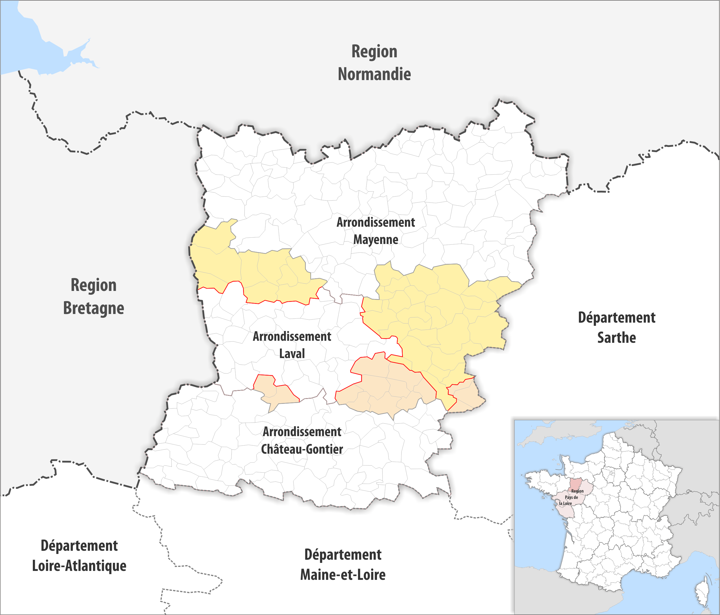 Arrondissements Anpassungen auf 2017 im Departement Mayenne